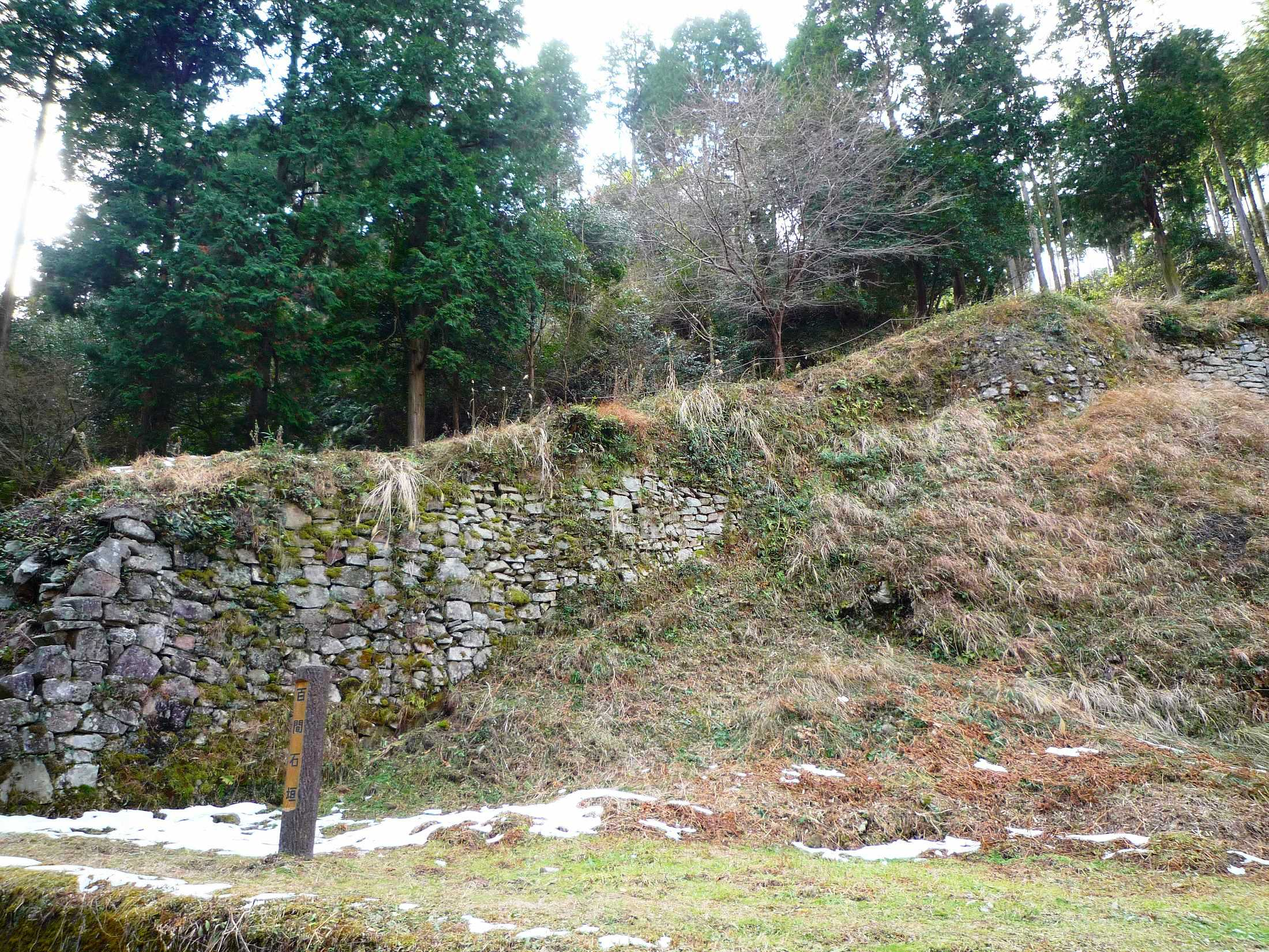 百間石垣（大野城跡）